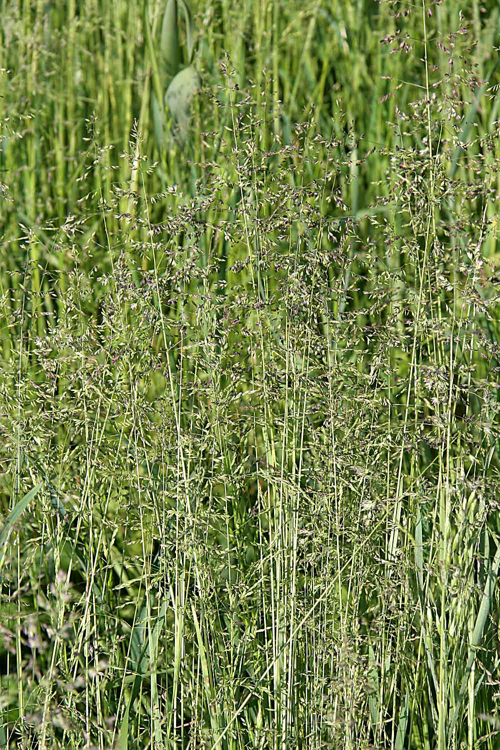 Agrostis tenuis Czech republic near Pardubice autor Prazak